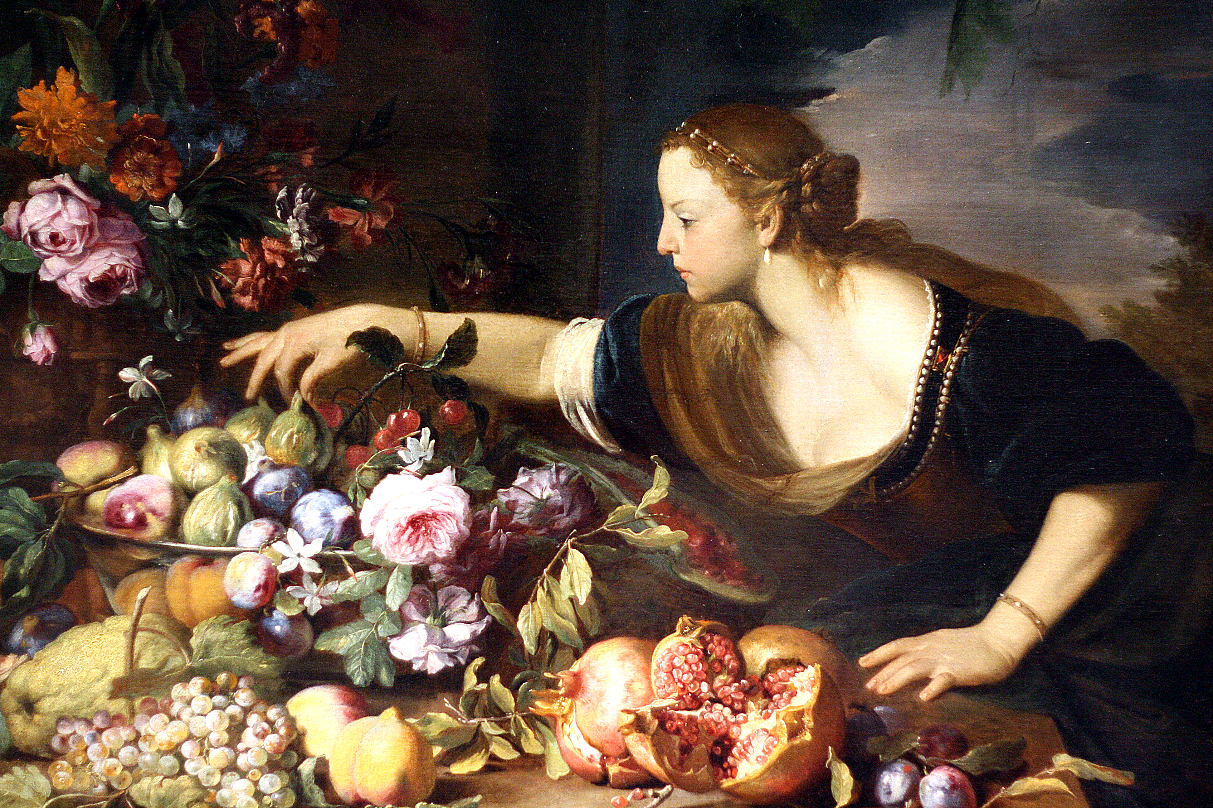 detail